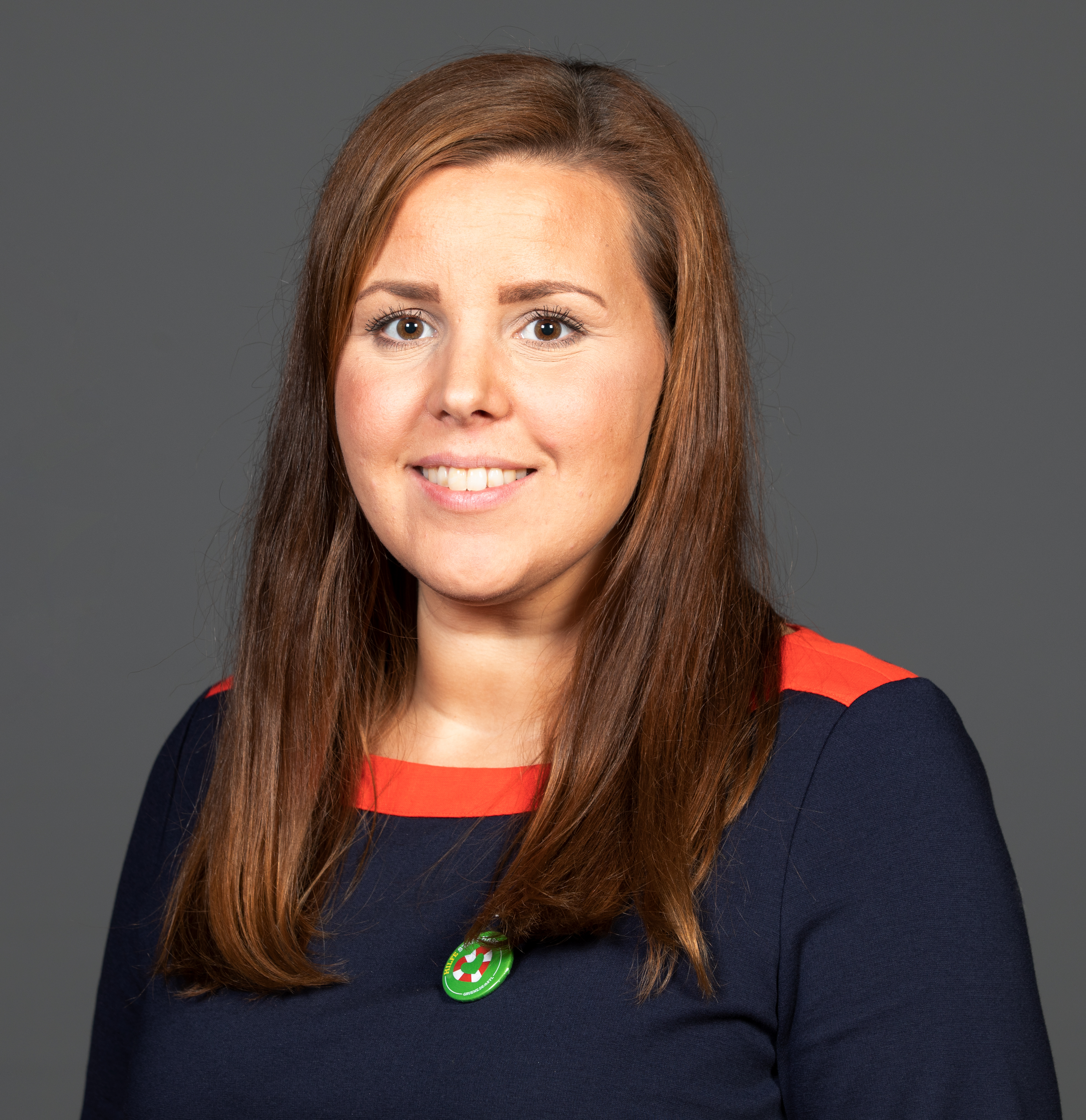 Anna Gallina (Bündnis 90/Die Grünen)